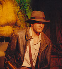 Photo personnelle du personnage de cire d'Indiana Jone, Mme Tussaud, Londres Source : Nataraja Statut : GFDL pour ce cadrage, ce format Nataraja